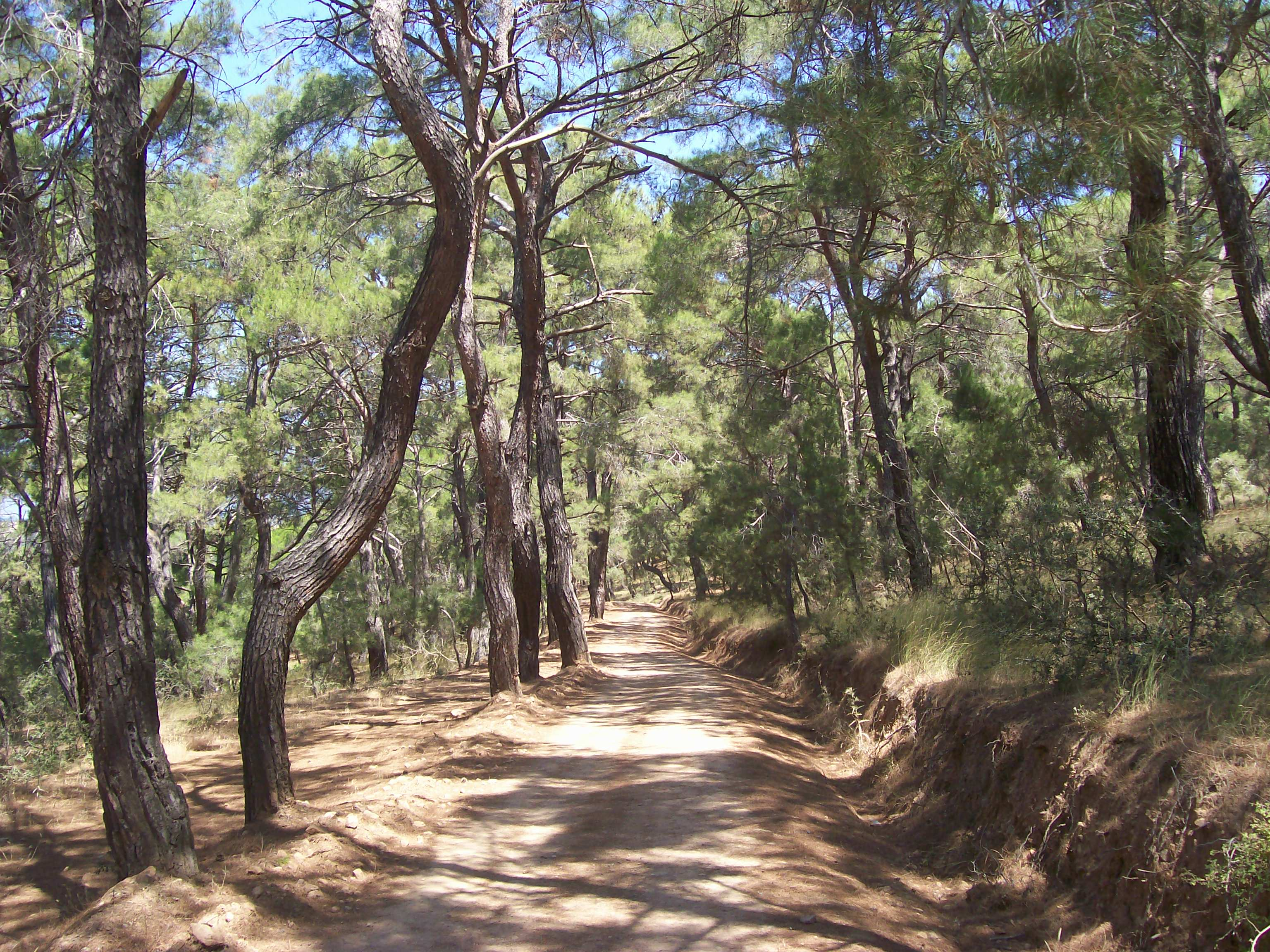 Çamlık